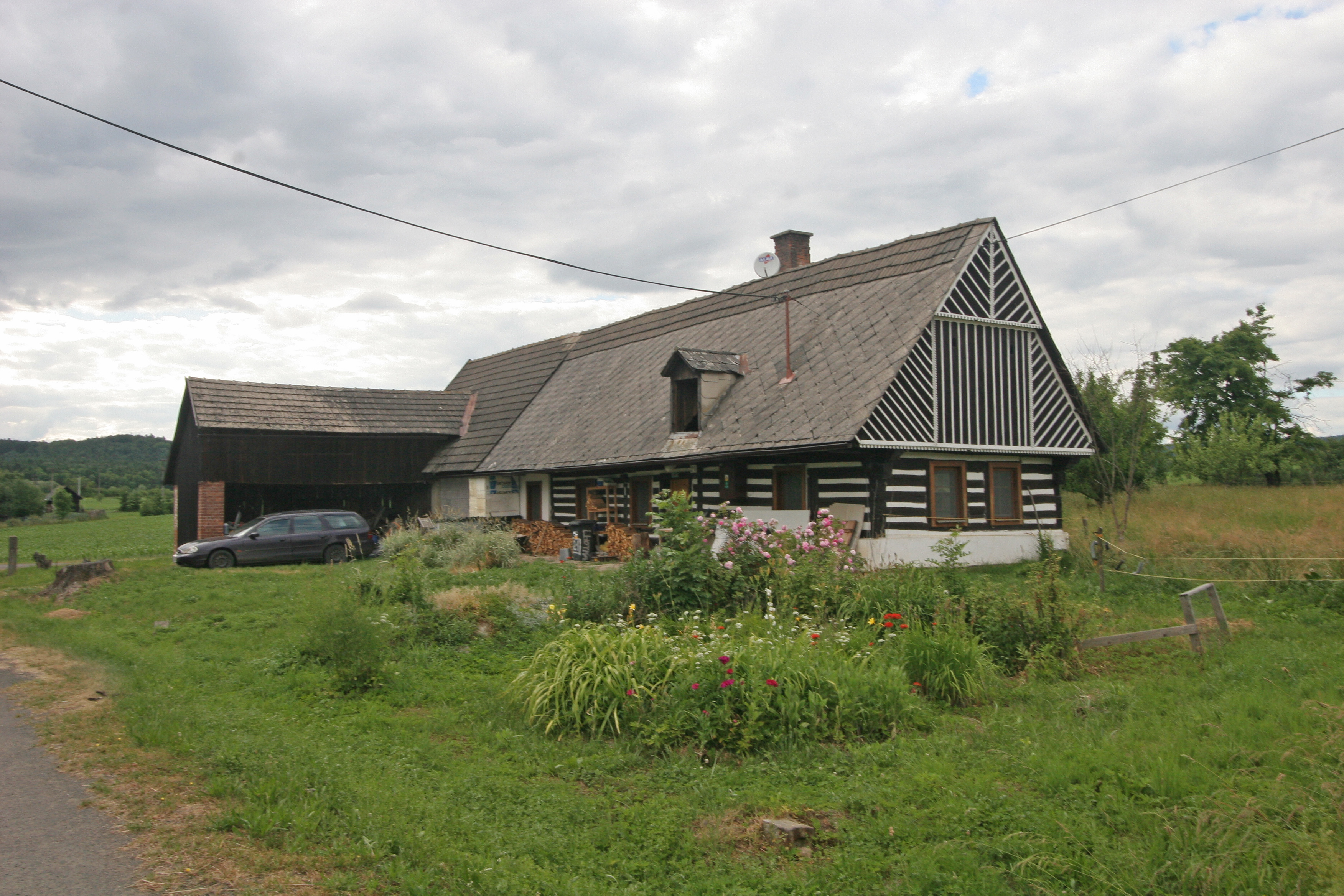 Lhotka u Lanžova čp. 21